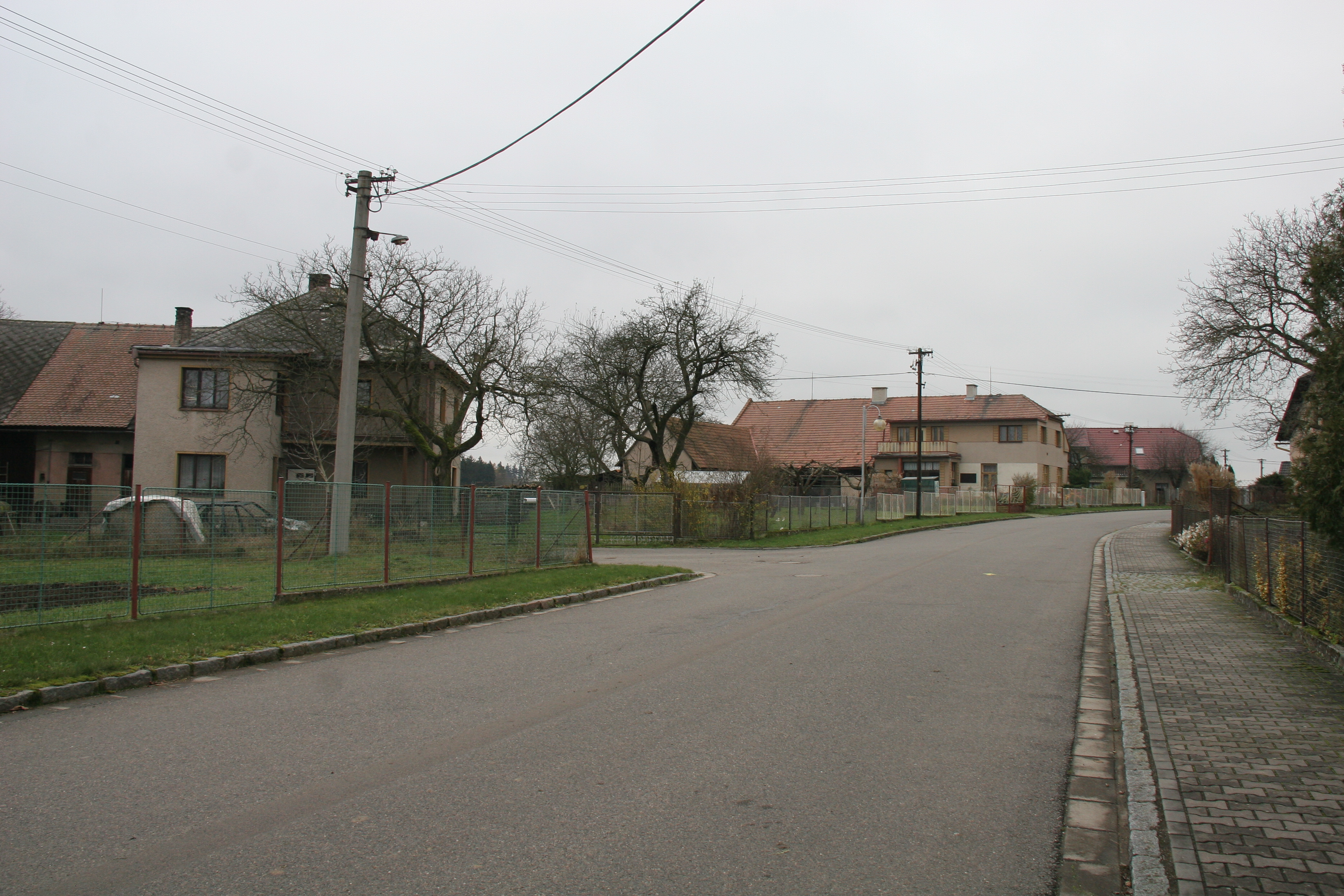 Křižanovice čp. 28